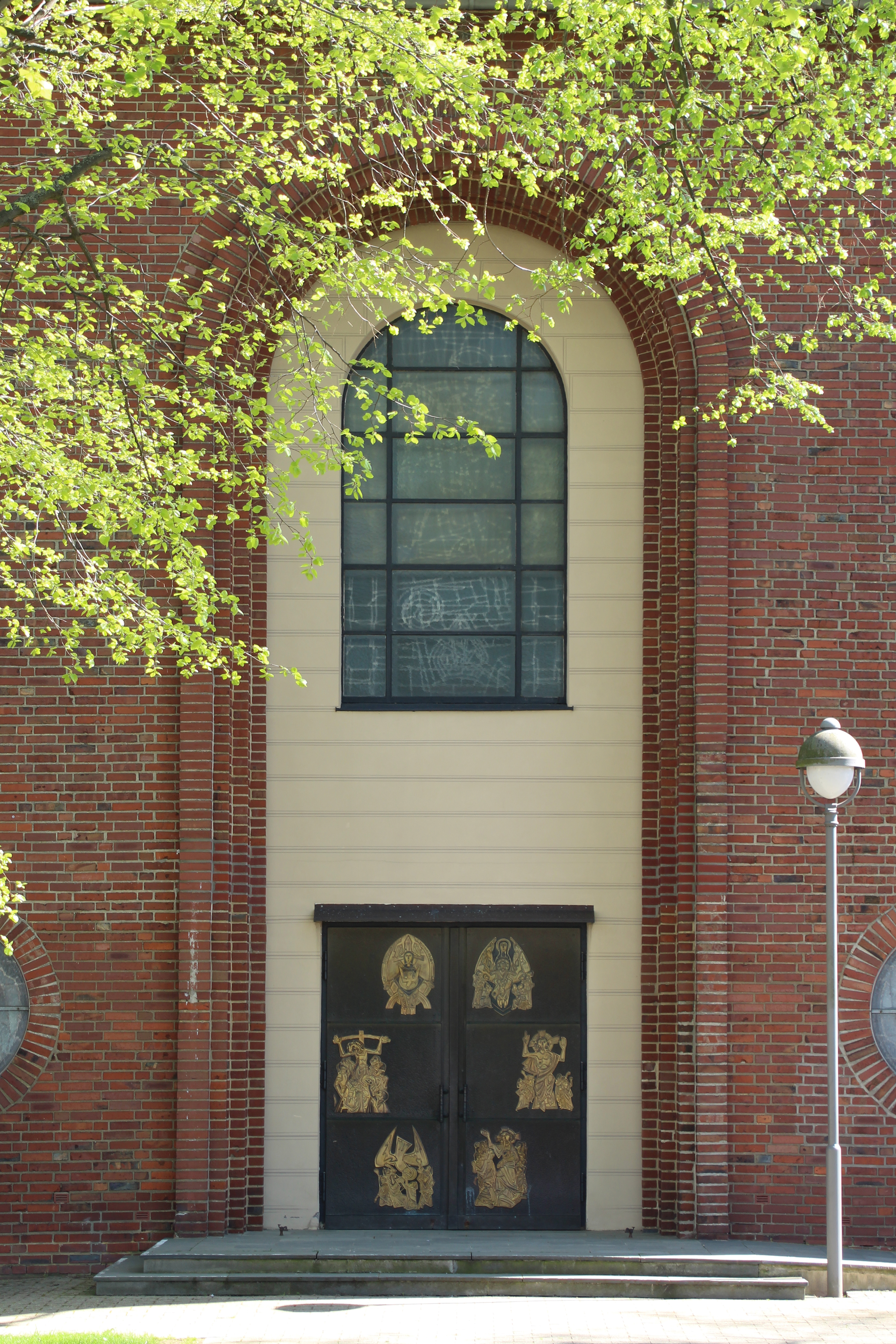 Hauptportal der Kath. Pfarrkirche St. Martinus in Schlich.